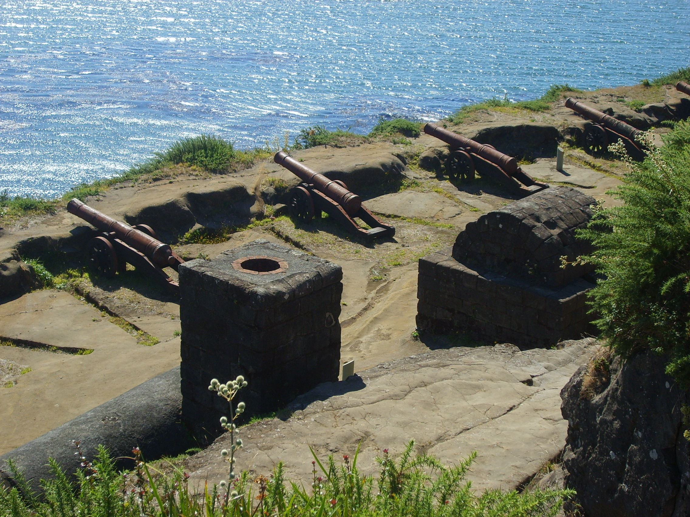 Fotografía de las baterias del Castillo de la Pura y Limpia Concepción de Monfort de Lemus en la ciudad de Valdivia, Chile. Foto obtenida por el autor Valo en Febrero de 2007